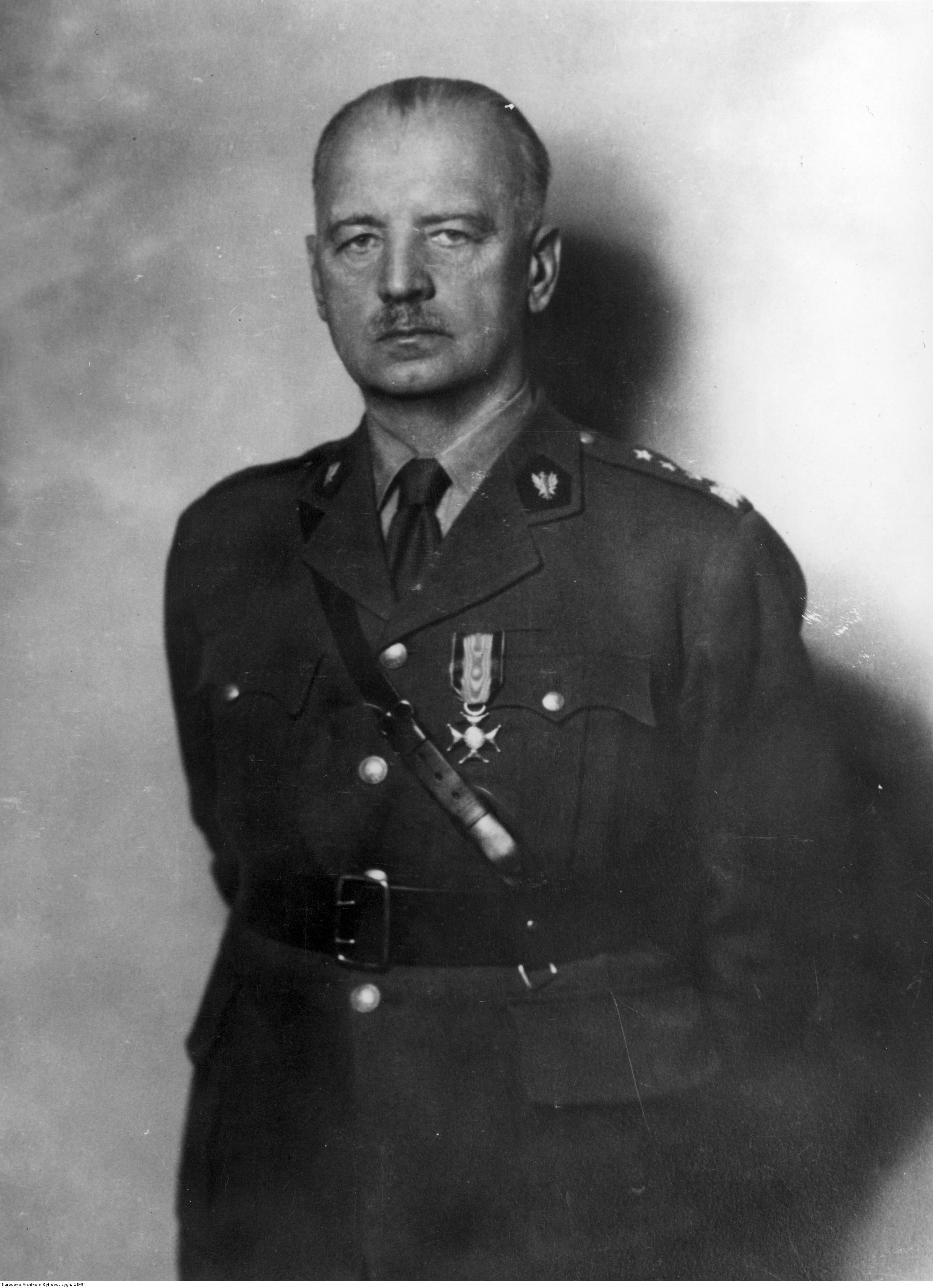 Władysław Sikorski (Londyn)